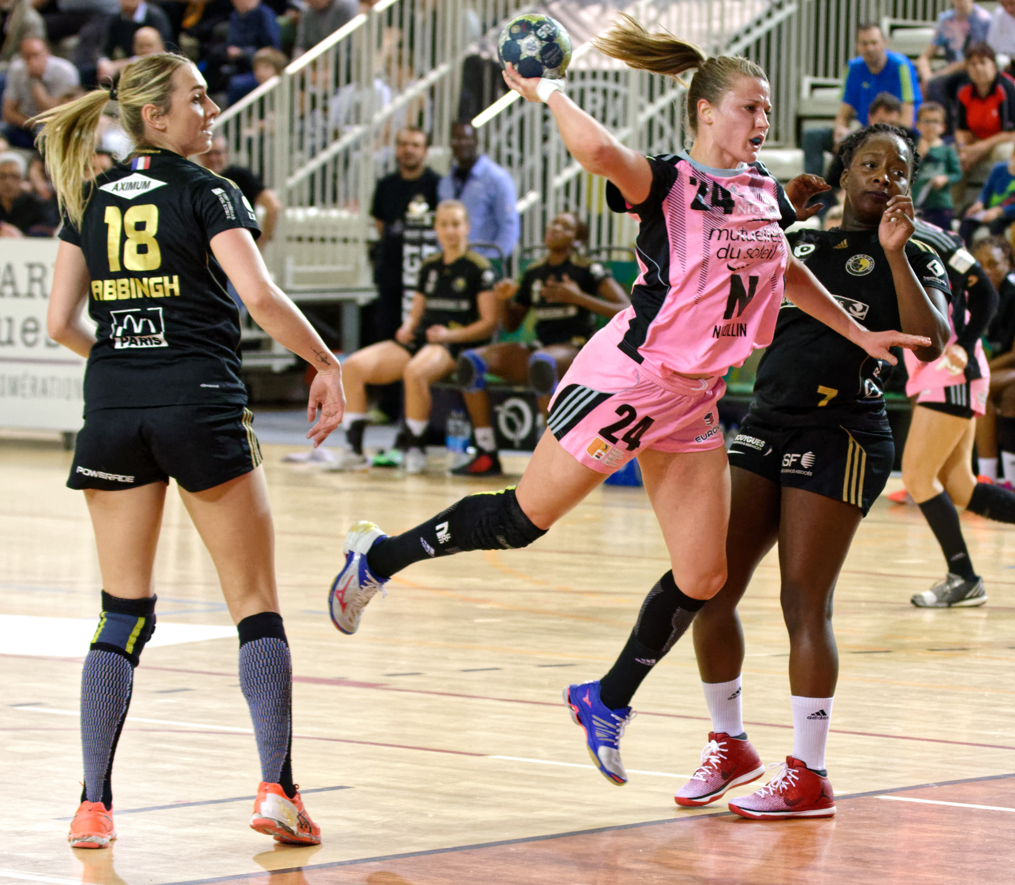 Rencontre de championnat entre Issy Paris Hand et OGC Nice. A Issy Les Moulineaux, le 2 février 2017.